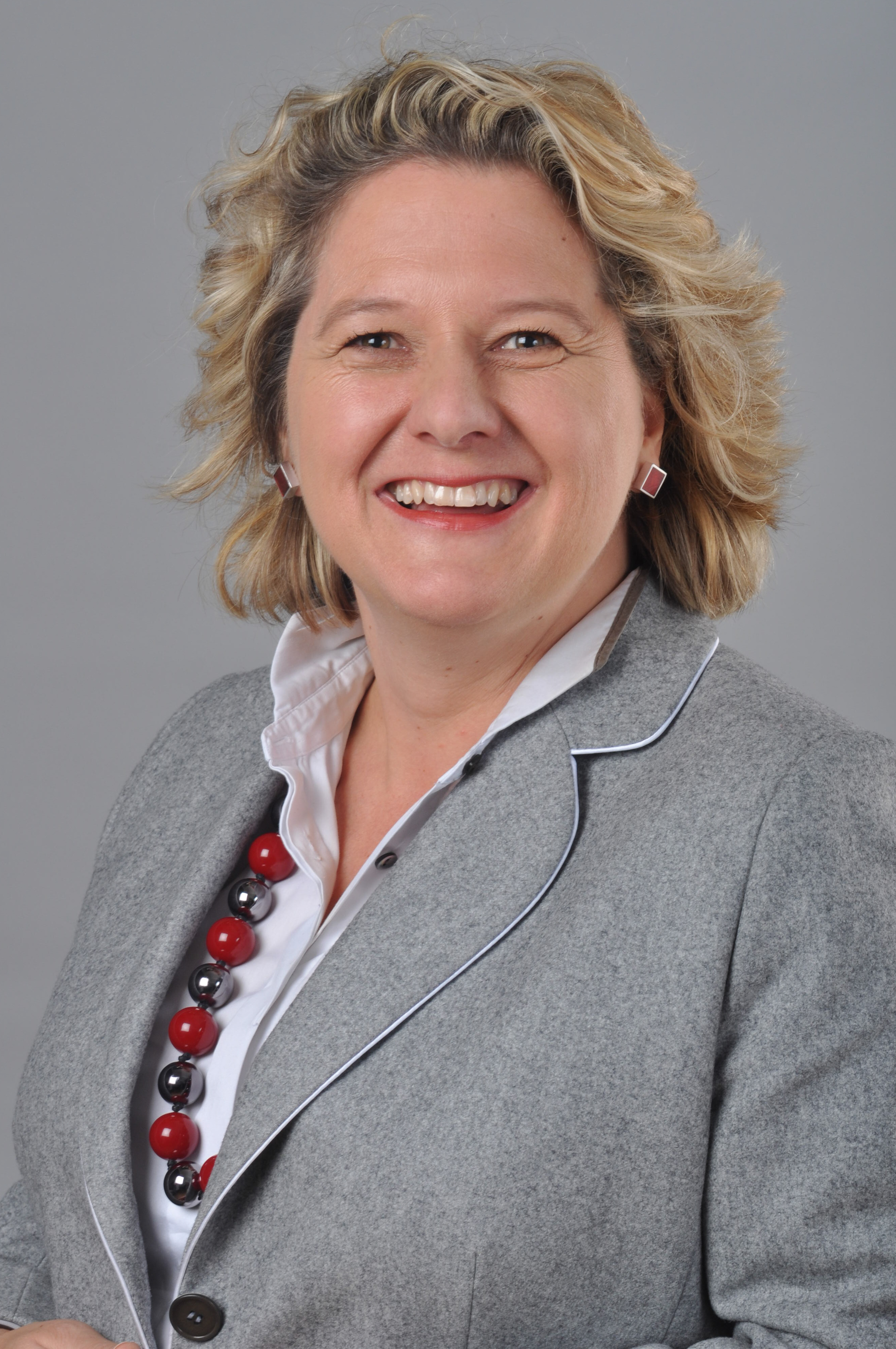 Svenja Schulze, SPD